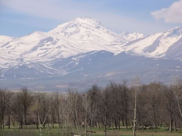 کوه سبلان، ساوالان داغی